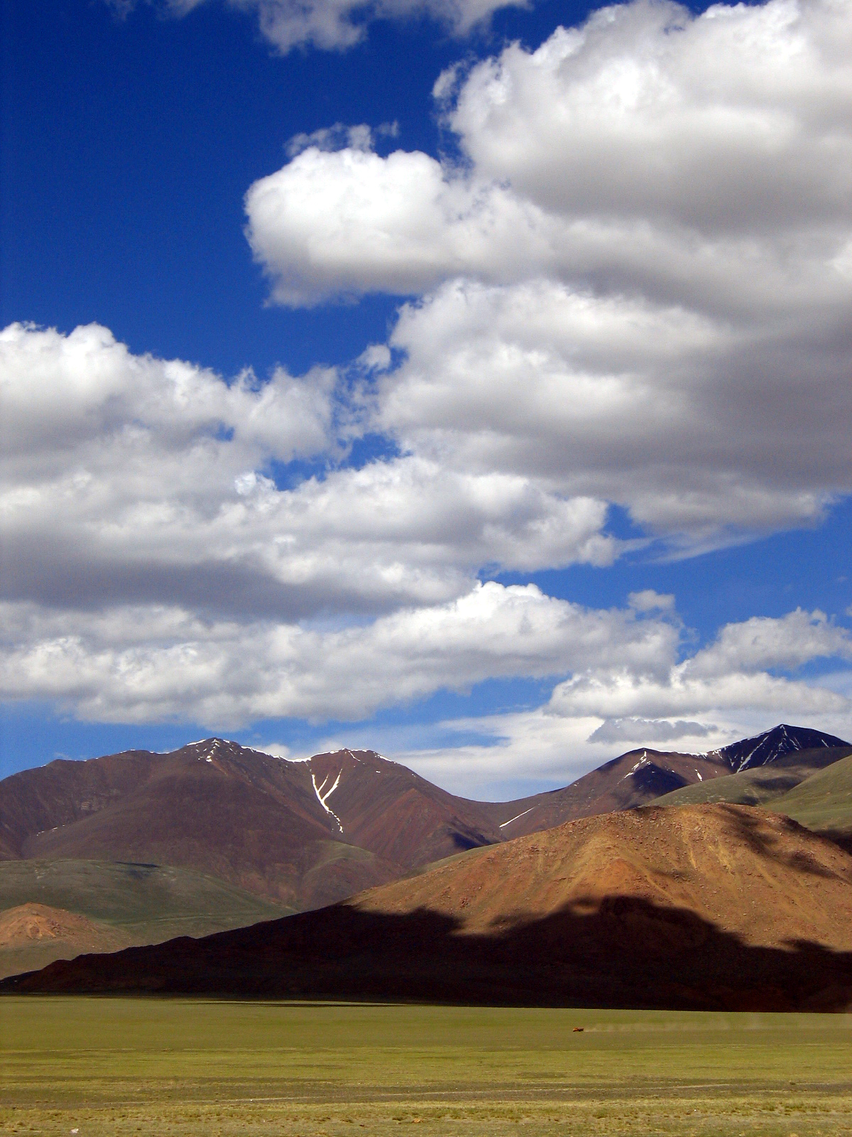 Mongolia Landscape